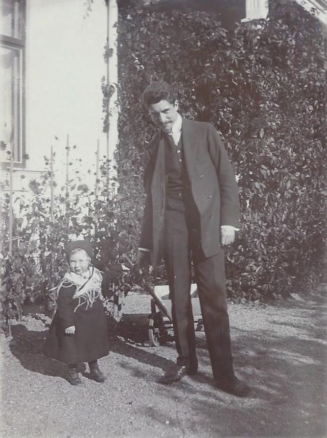 "Verna och Friedrich Stieve på Saltsjöbaden". Troligen 1906, då Verna Lindberg föddes i januari 1905.